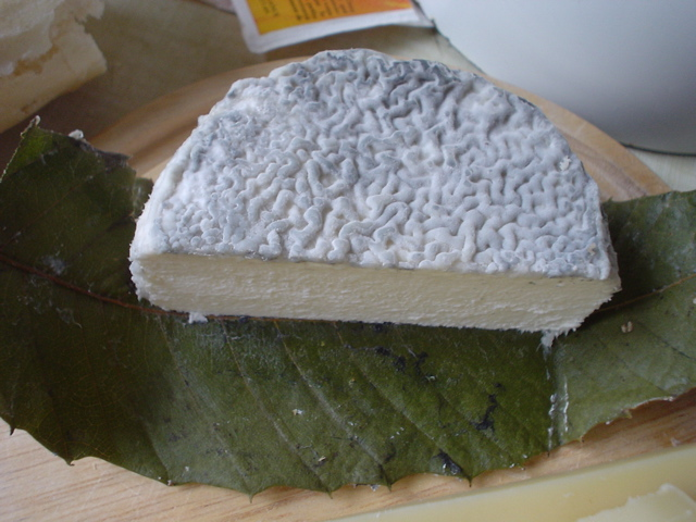 Moitié de pélardon cendré